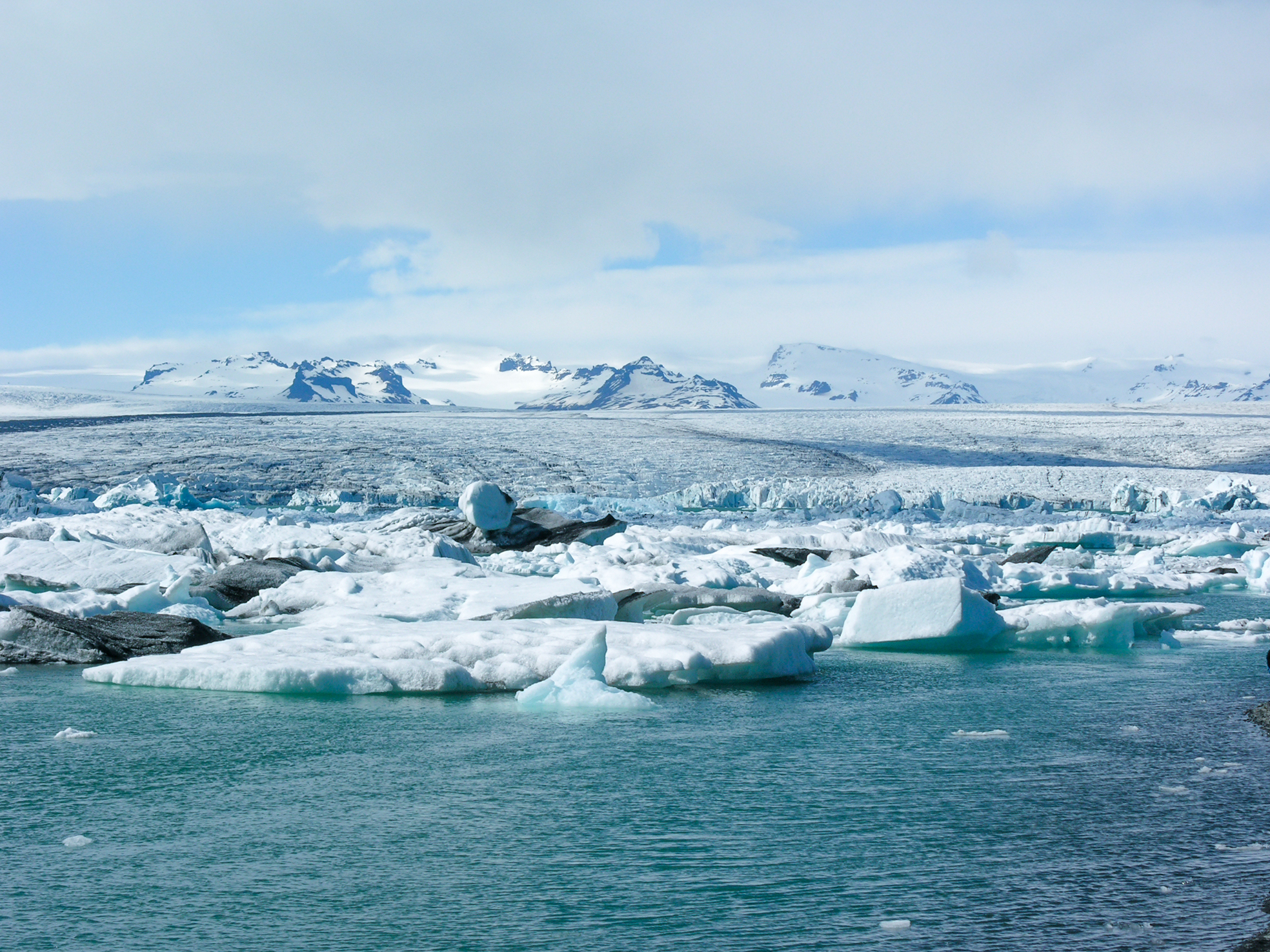 Iceland, Jökulsárlón